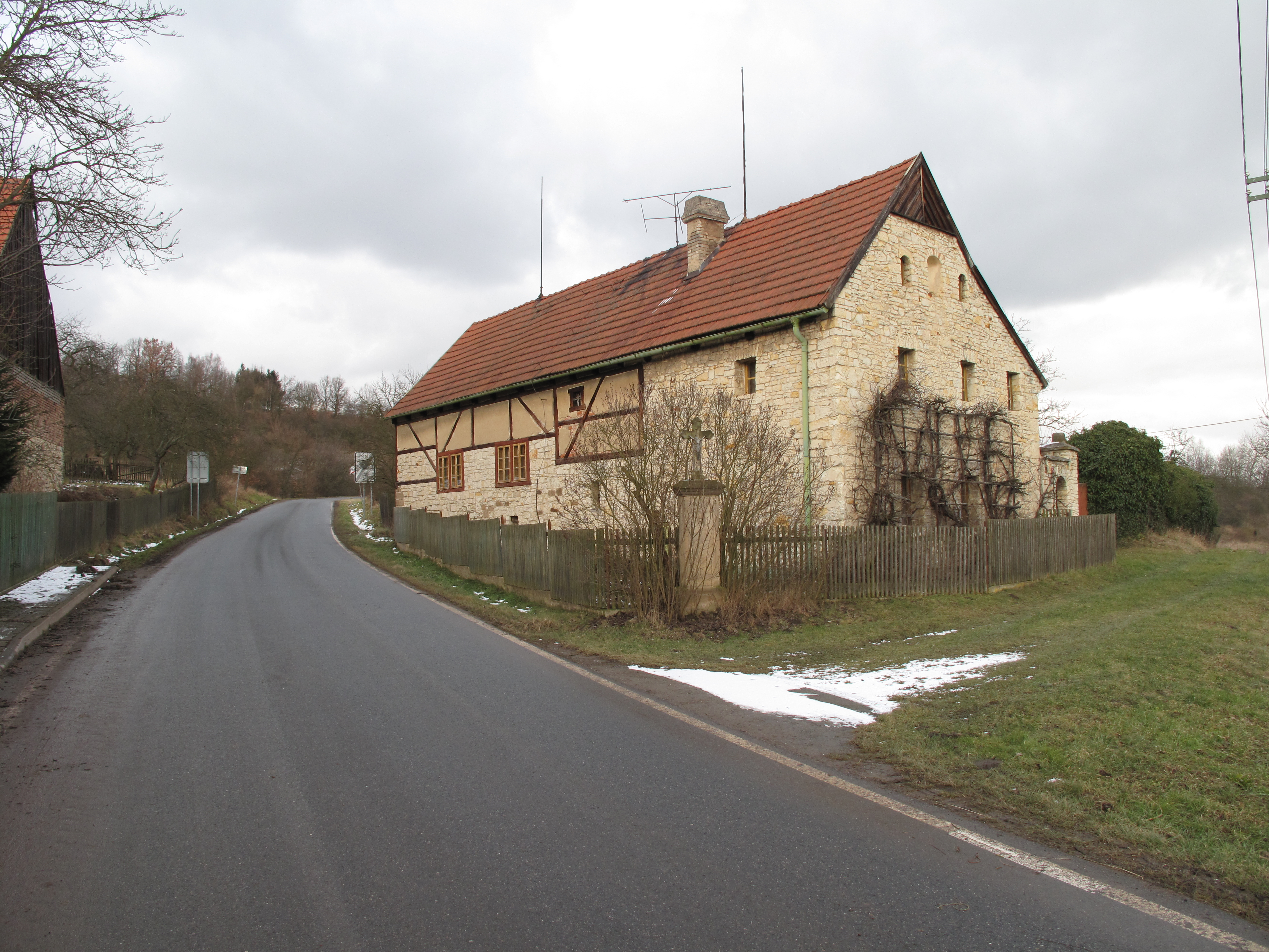 Hrázděný dům v Kalivodech. Okres Rakovník, Česká republika.